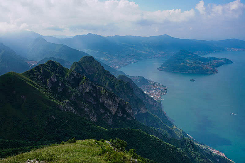 Veduta da Corna Trentapassi m 1.248 s.l.m.